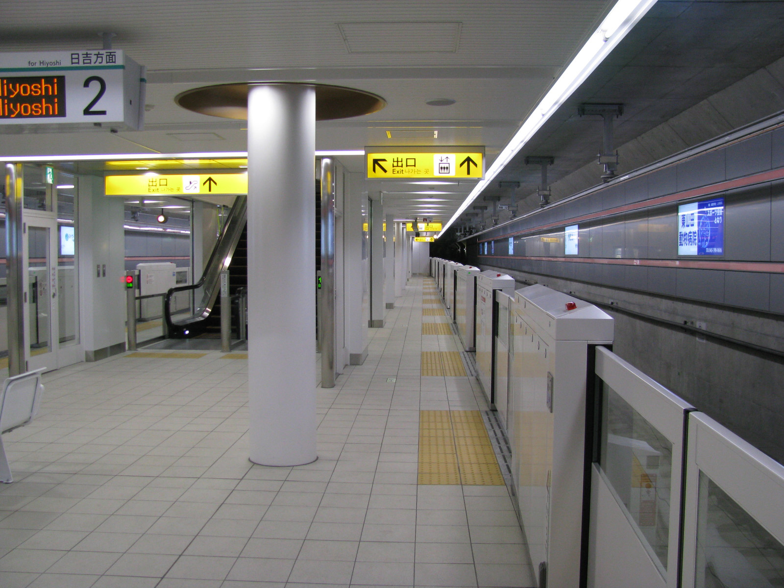 横浜市営地下鉄グリーンライン東山田駅